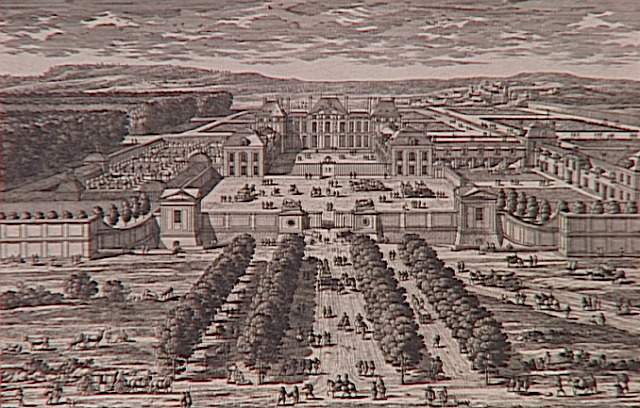 Vue perspective du château de Sceaux au temps de Colbert, prise depuis l'avenue d'entrée. Gravure de Pérelle.